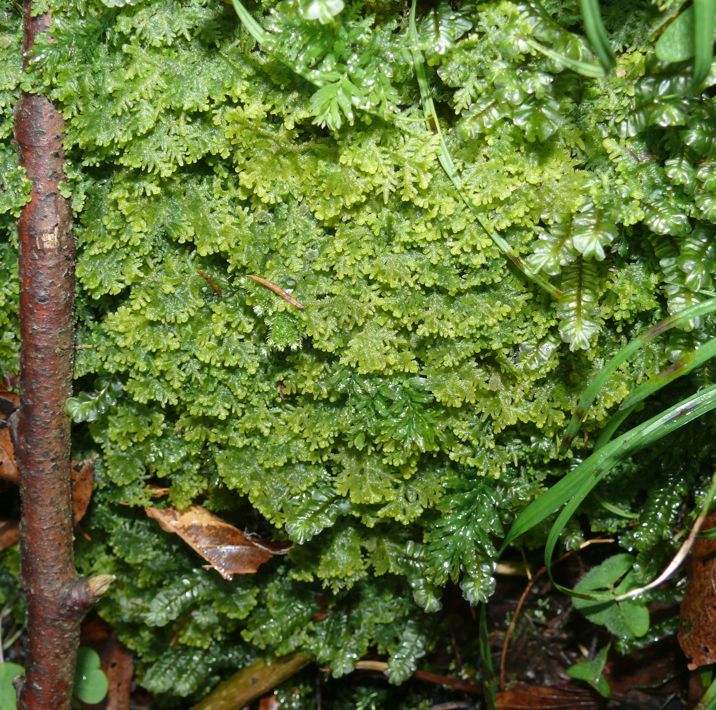 Trichocolea tomentella, Schwäbisch-Fränkische Waldberge, Germany